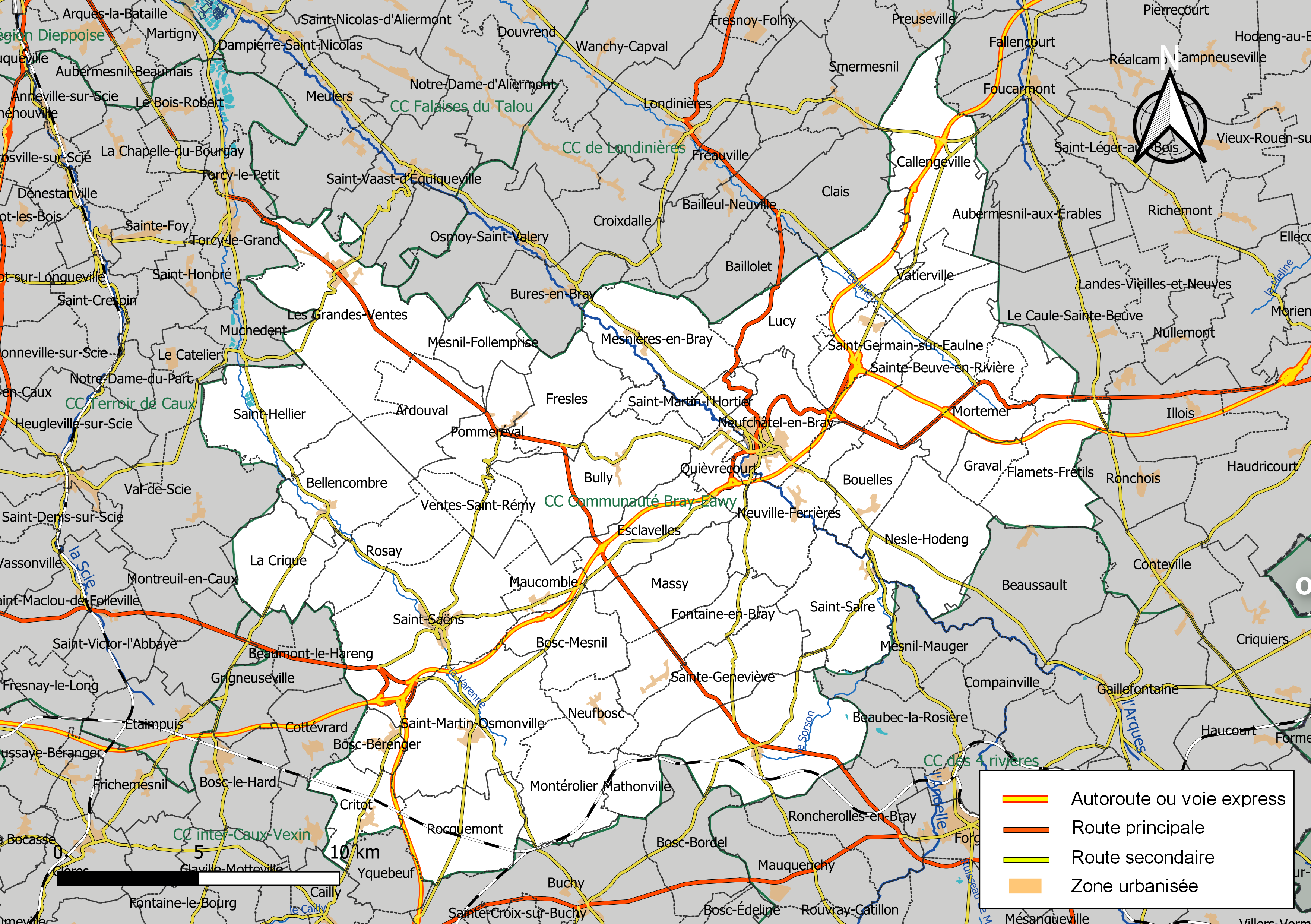 Carte géographique de la Communauté de communes Communauté Bray-Eawy, département de la Seine-Maritime, France. Composition au 1er janvier 2019.